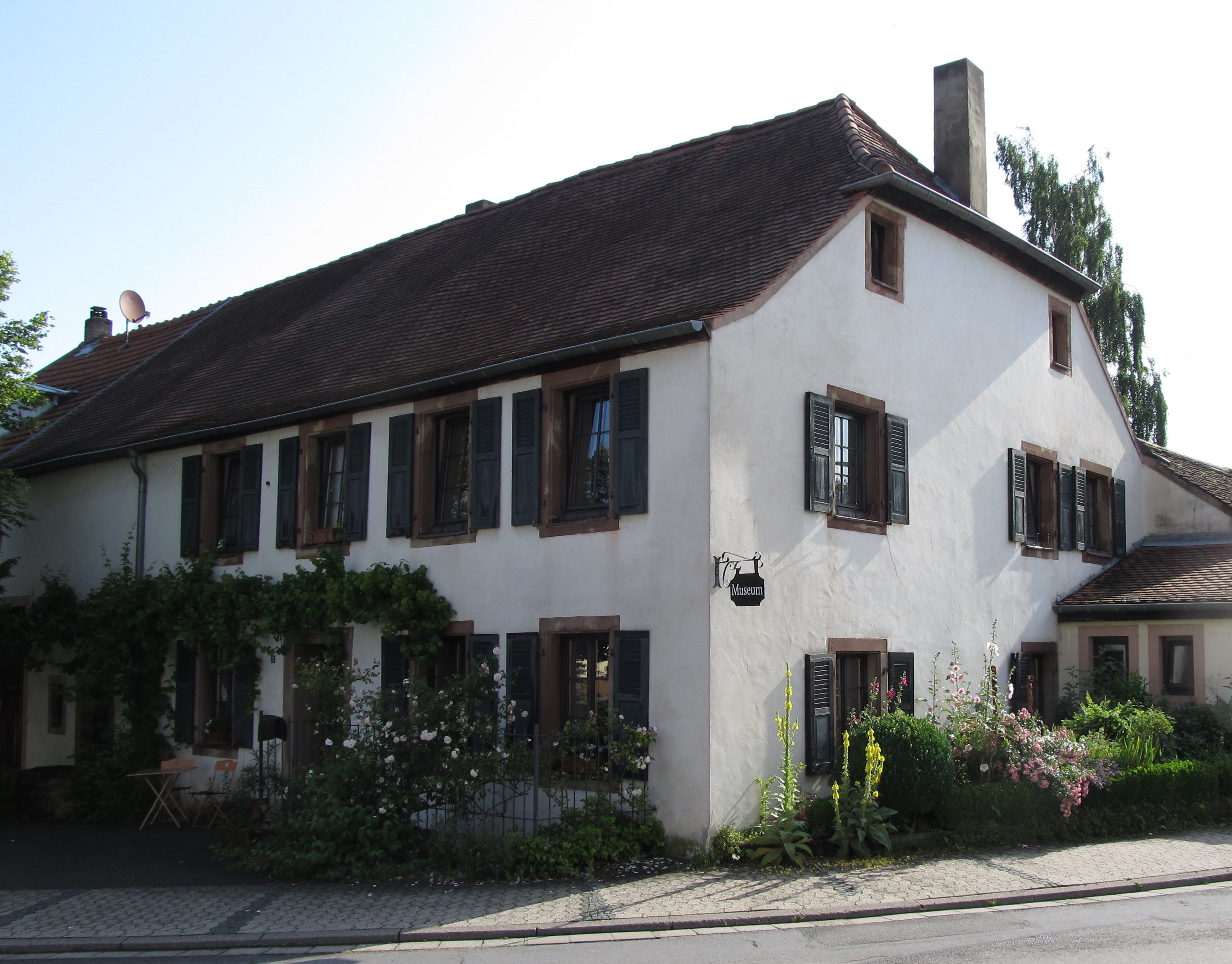 Das Museum für dörfliche Alltagskultur in Rubenheim, Saarland